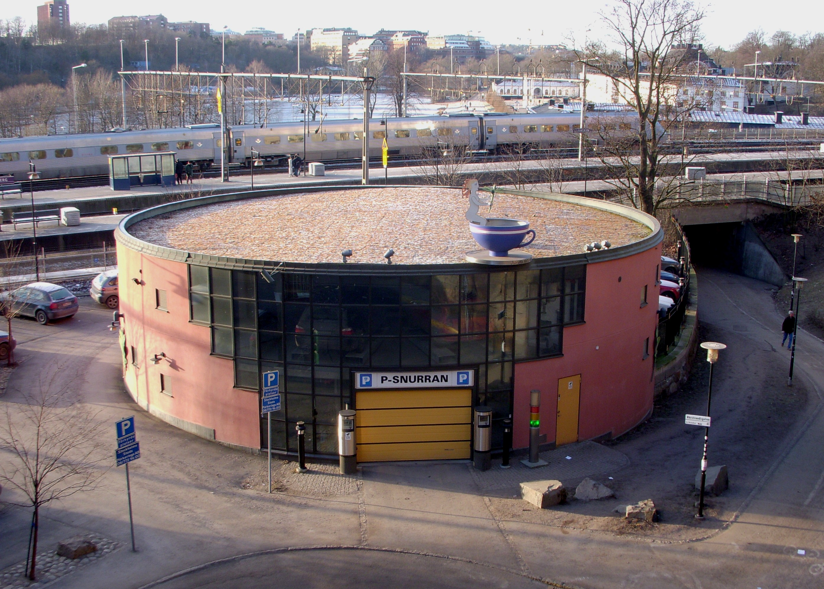 Parkeringshus "P-snurran", Rörstrandsgatan 41 i Stockholm